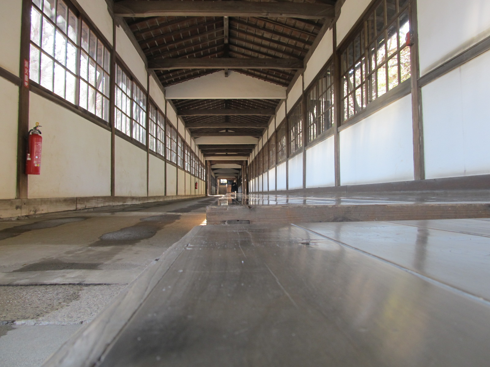 雑巾がけ直後の總持寺の長廊下と、その土間に水で引かれた二本線。